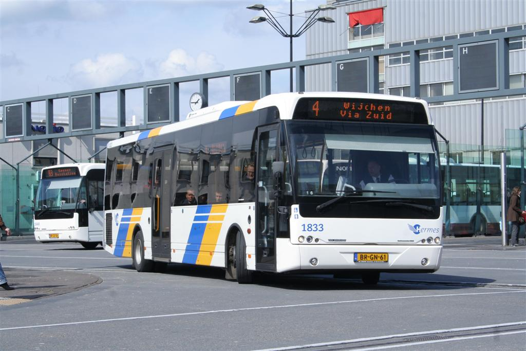 Een bus van Hermes op het stationsplein van Nijmegen.